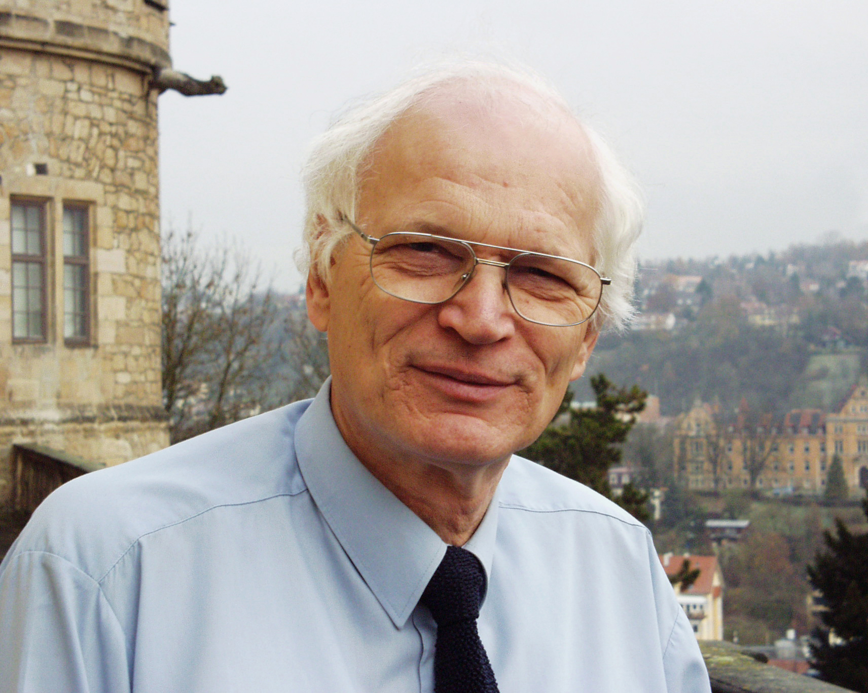 Porträtaufnahme von Friedhelm Prayon vor dem Schloß Hohentübingen.